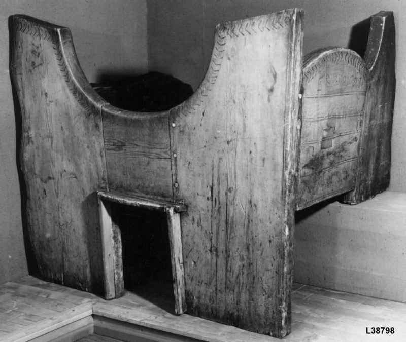 Seng eller "kvile" fra Valle i Setesdal. Foto Norsk Folkemuseum, NF.1911-0631.